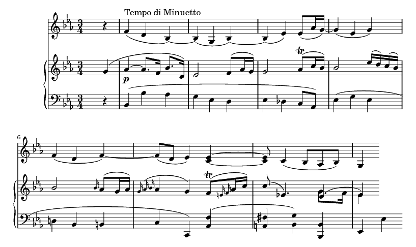 Tema del segundo movimiento de la sonata Op 30 nº 3 de Beethoven